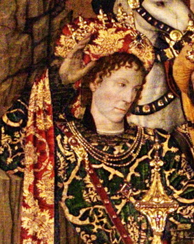 Capella Reial de Santa Àgata (Barcelona). Retaule del Conestable, obra de Jaume Huguet (1464-1465). Tremp sobre taula (673 x 368 cm)